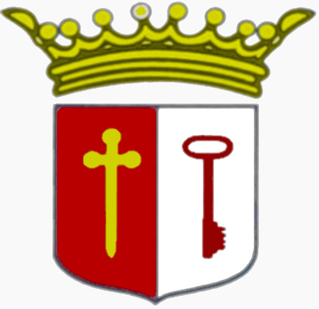 Armoiries de Jougne (Doubs - France) : partie de gueules à l'épée d'or mise en pal au premier et d'argent à la clef de gueules au second.